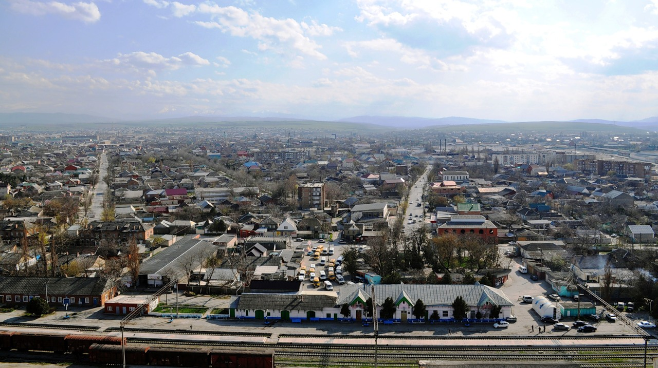 Вид на город Хасавюрт